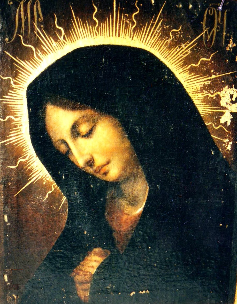 Maica Domnului – atribuită lui Nicolae Teodorescu - u/p, 46,5x37 cm, nesemnat, nedatat (prima jumătate a sec. XIX)